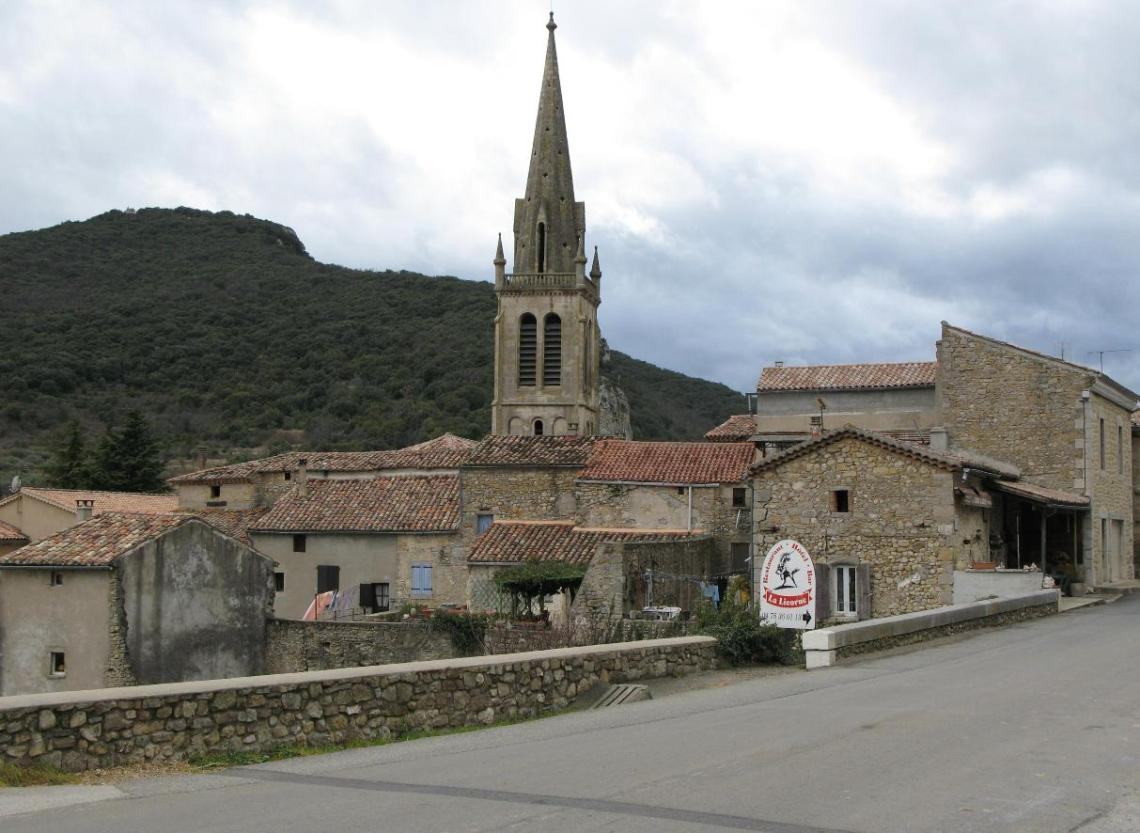 village de saint-sauveur de Cruzières (Ardèche)